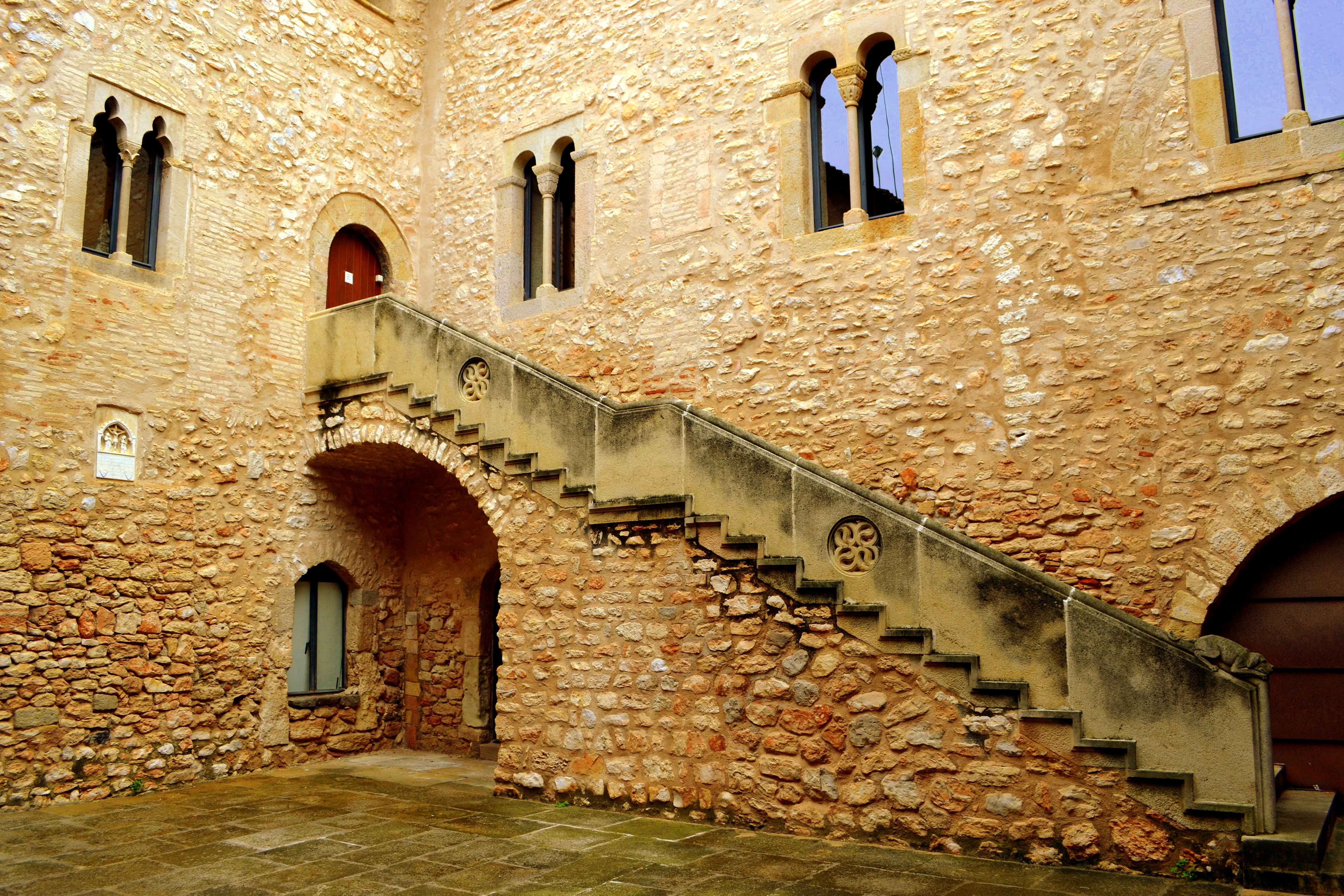 Castell reconstruït sobre l'estructura d l'antic edifici medieval, bastits entre els segles XII i XV, del qual en conserva diversos elements remarcables, com les finestres gòtiques o els escuts esculpits. No s'ha conservat l'antiga torre mestra, de planta circular. La restauració va ser duta a terme per Jeroni Martorell sota el patrocini de Josep Font Gumà.